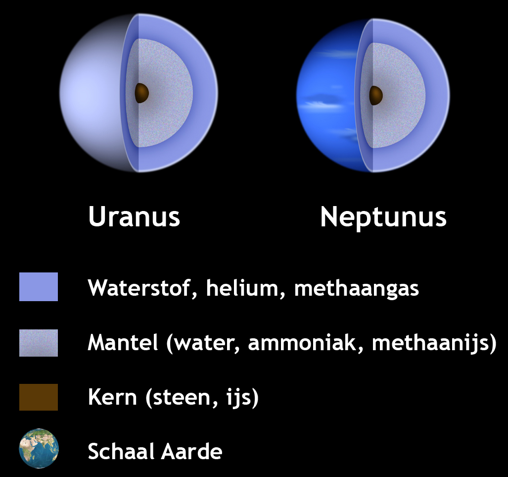 Nederlandse bewerking van de NASA afbeelding op Wikipedia Commons. In lijn met nieuwe inzichten zijn de ijsreuzen apart afgebeeld en is tevens de legenda vertaald in het Nederlands.